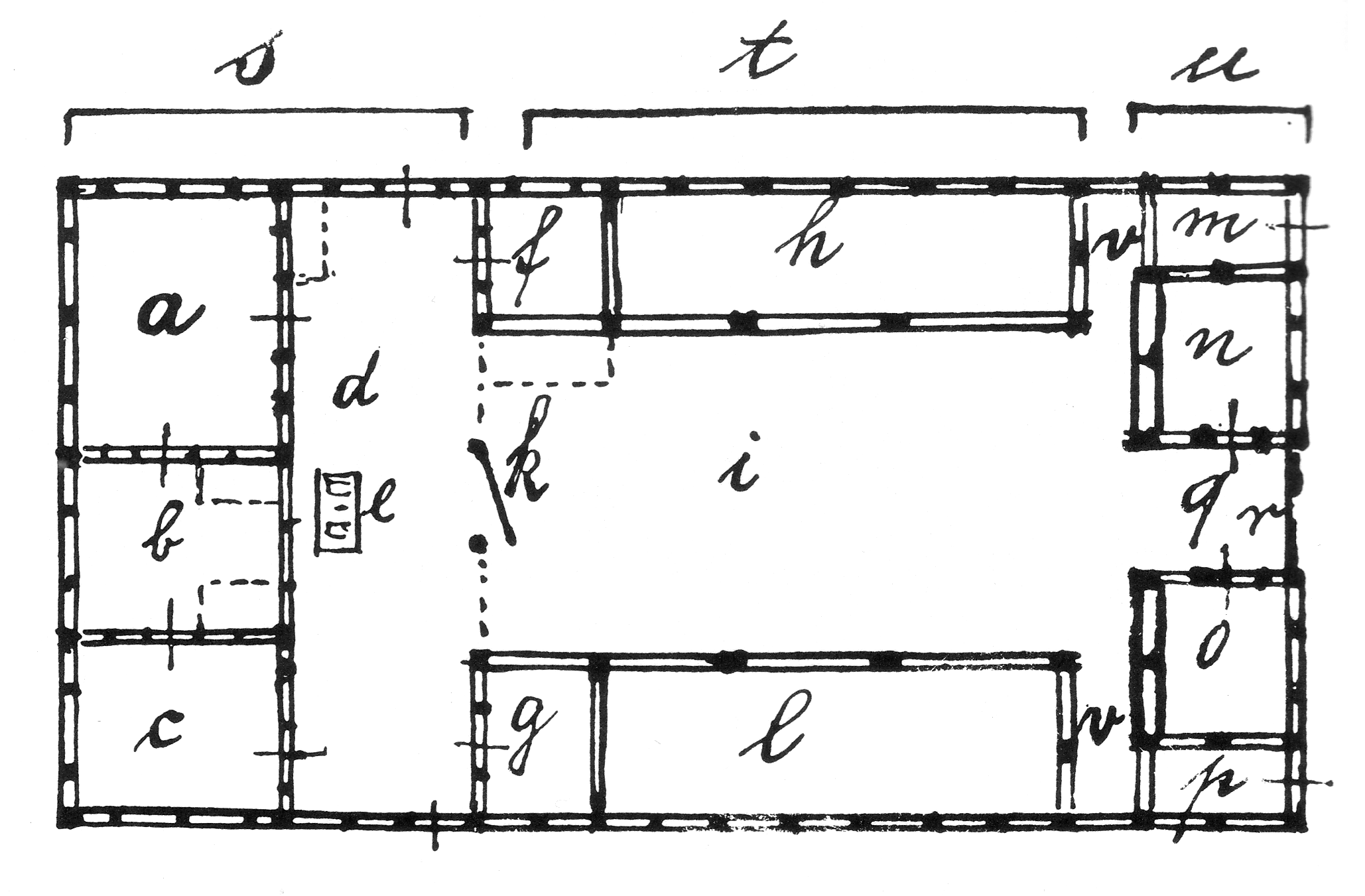 Dat ole Huus (plattdeutsch für Das alte Haus ist ein in seiner ältesten Bausubstanz auf das 16. Jahrhundert zurückgehendes niedersächsisches Hallenhaus in Wilsede, Lüneburger Heide. Im Jahr 1907 wurde es vom Schullehrer und Heimatforscher Bernhard Dageförde (1866–1940) aus eigenen Mitteln aufgekauft und als Heidemuseum ausgestattet. Die Grafik zeigt eine Grundrisszeichnung des Hauses, angefertigt von Dageförde. Die folgende Legende wurde mit veränderter Interpunktion aus der Quelle (s.u.) übernommen: a) Große Stube; b) Stubenkammer; c) Altenteilerstube; d) Flett; e) Feuerherd; f) Kleine Stube; g) Speisekammer; h) Kuhstall; i) Diele; k) Gatter mit Tür; l) Ochsen- und Güstviehstall; m) Kälberstall; n) Pferdestall, darüber auch Knechtskammer; o) Pferdestall, darüber Hühnerwiemen; p) Kälberstall, q) «Missen», r) Missentür oder große Tür, s) Hinterhaus, t) Misthaus, u) Vorderhaus, v) Kälberbuchten. Gestrichelte Rechtecke bezeichnen Butzen oder Alkoven, frühere Schlafstätten in der Nordheide.